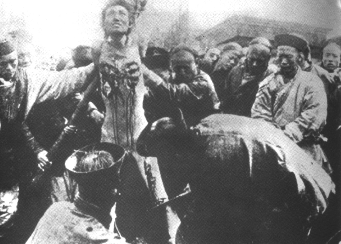 Regard extasé du Supplicié d'après Georges Bataille